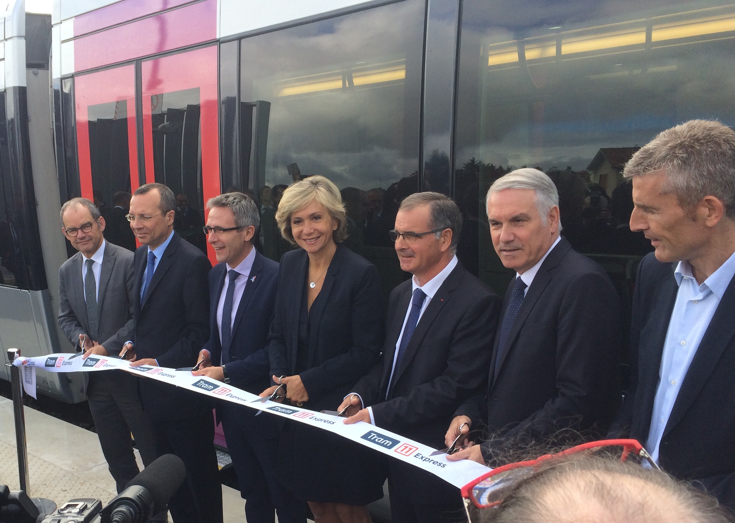 Coupure du ruban inaugural du T11 Express